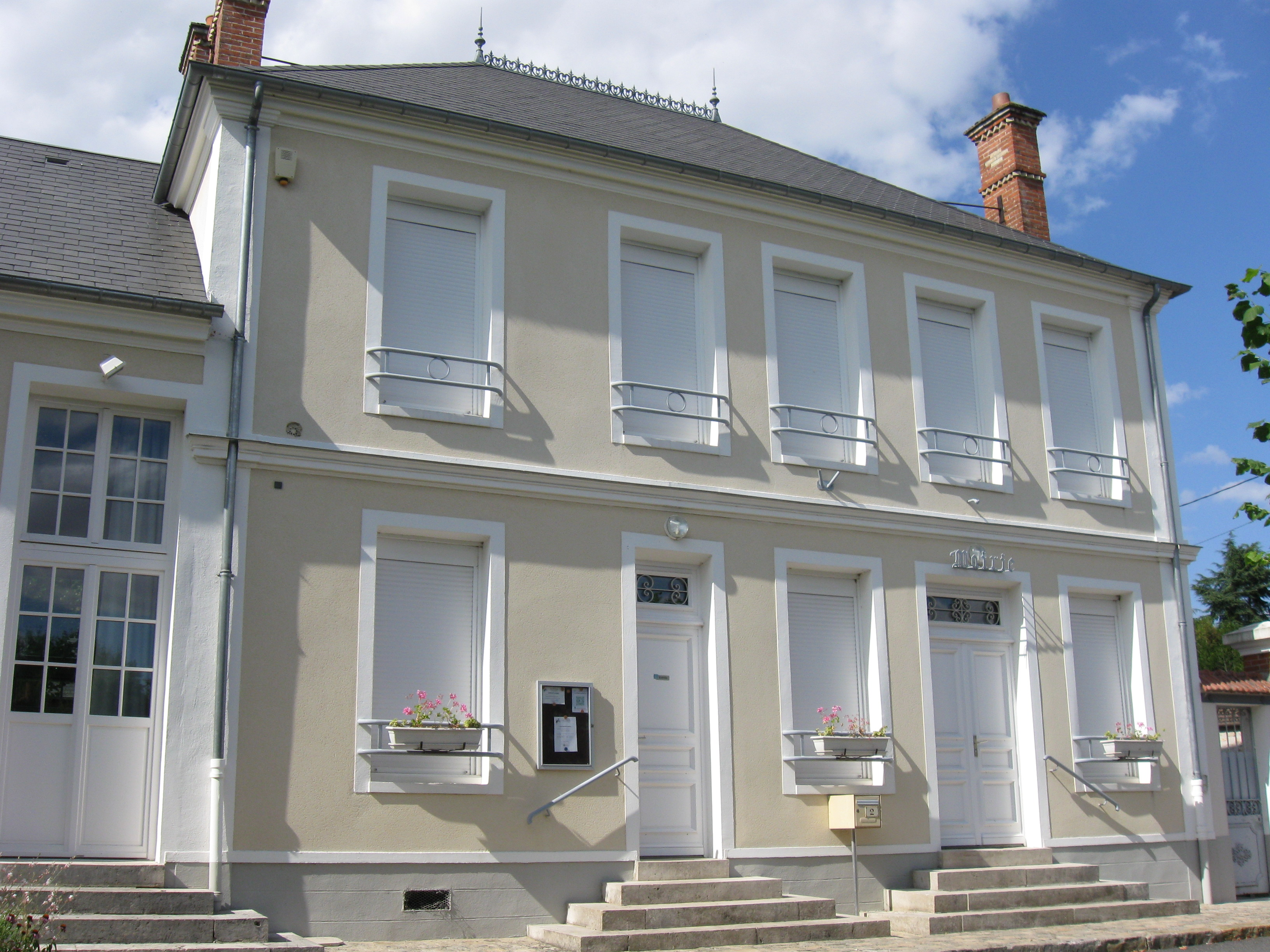 Mairie de Nanteau-sur-Essonne. (Seine-et-Marne, région Île-de-France).